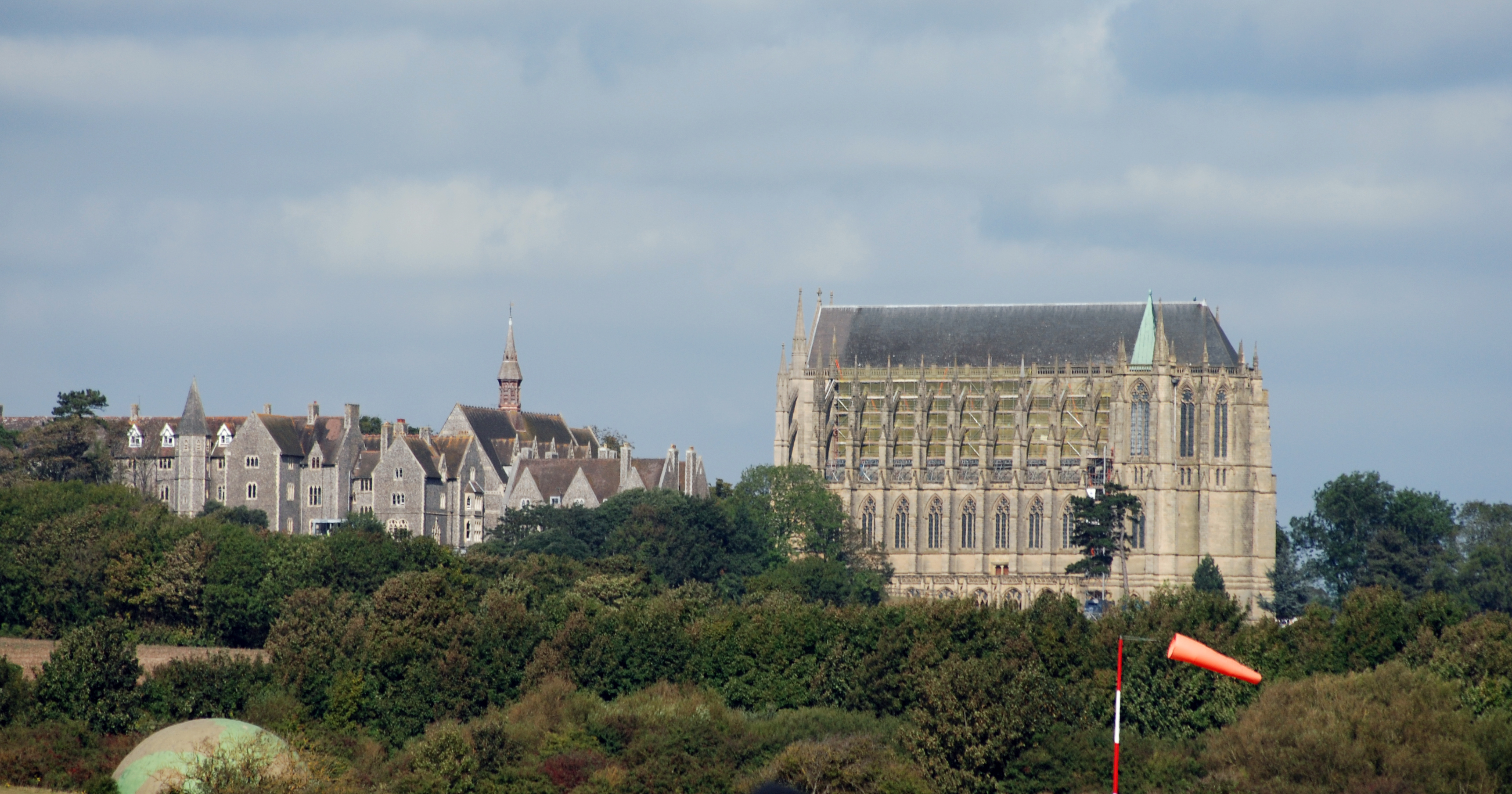 @Shoreham RAFA day 16/9/07